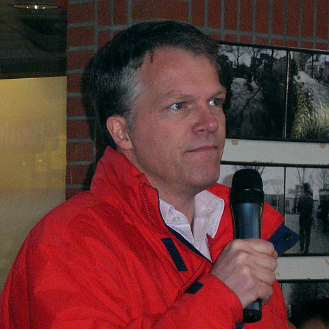 Wouter Bos, Dutch leader of the PvdA (Labour party) campaigning in Hengelo, November 17th 2006 Location: Hengelo (Overijssel), Netherlands --- nl: Wouter Bos, partijleider en lijsttrekker van de PvdA tijdens campagneoptreden in Hengelo (Overijssel) op 17 november 2006 Locatie: Winkelcentrum "Groot Driene", Hengelo (Overijssel) Trefwoorden: Partij van de Arbeid